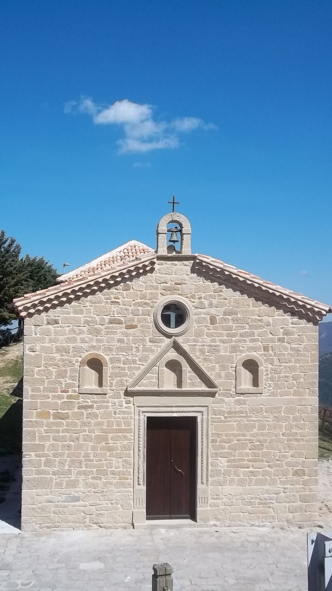 pietrapertosa